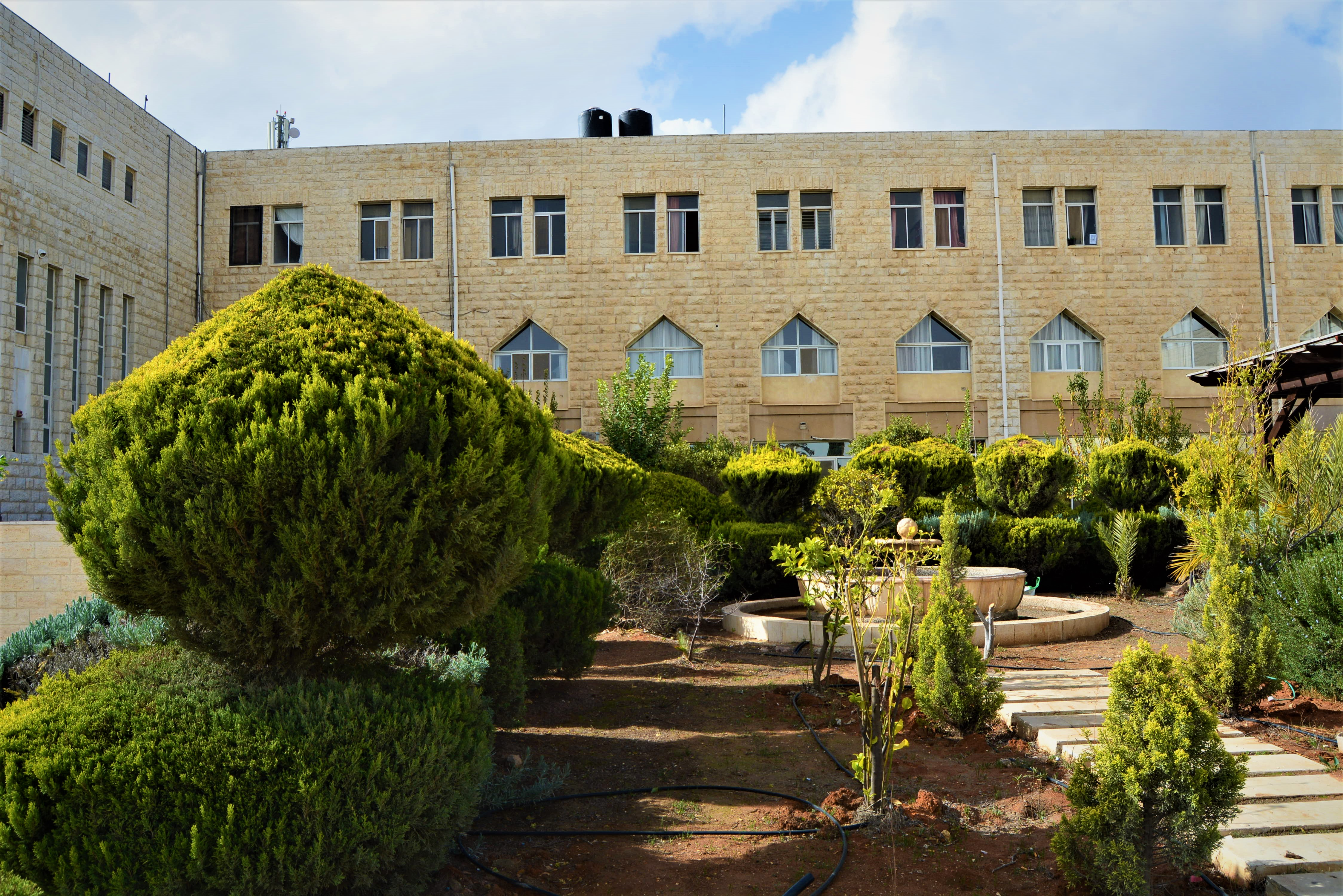 مبنى كلية العلوم والتكنولوجيا